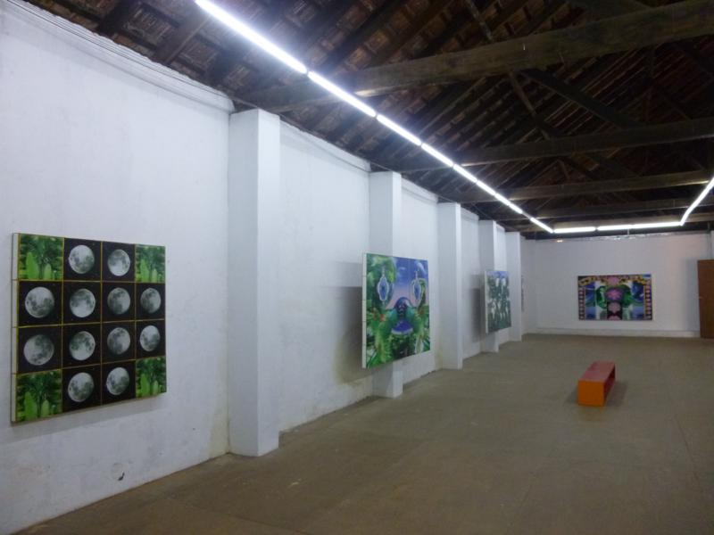 Exposición de arte de M.I.A., en Biennale, en la ciudad de Kochi, India.